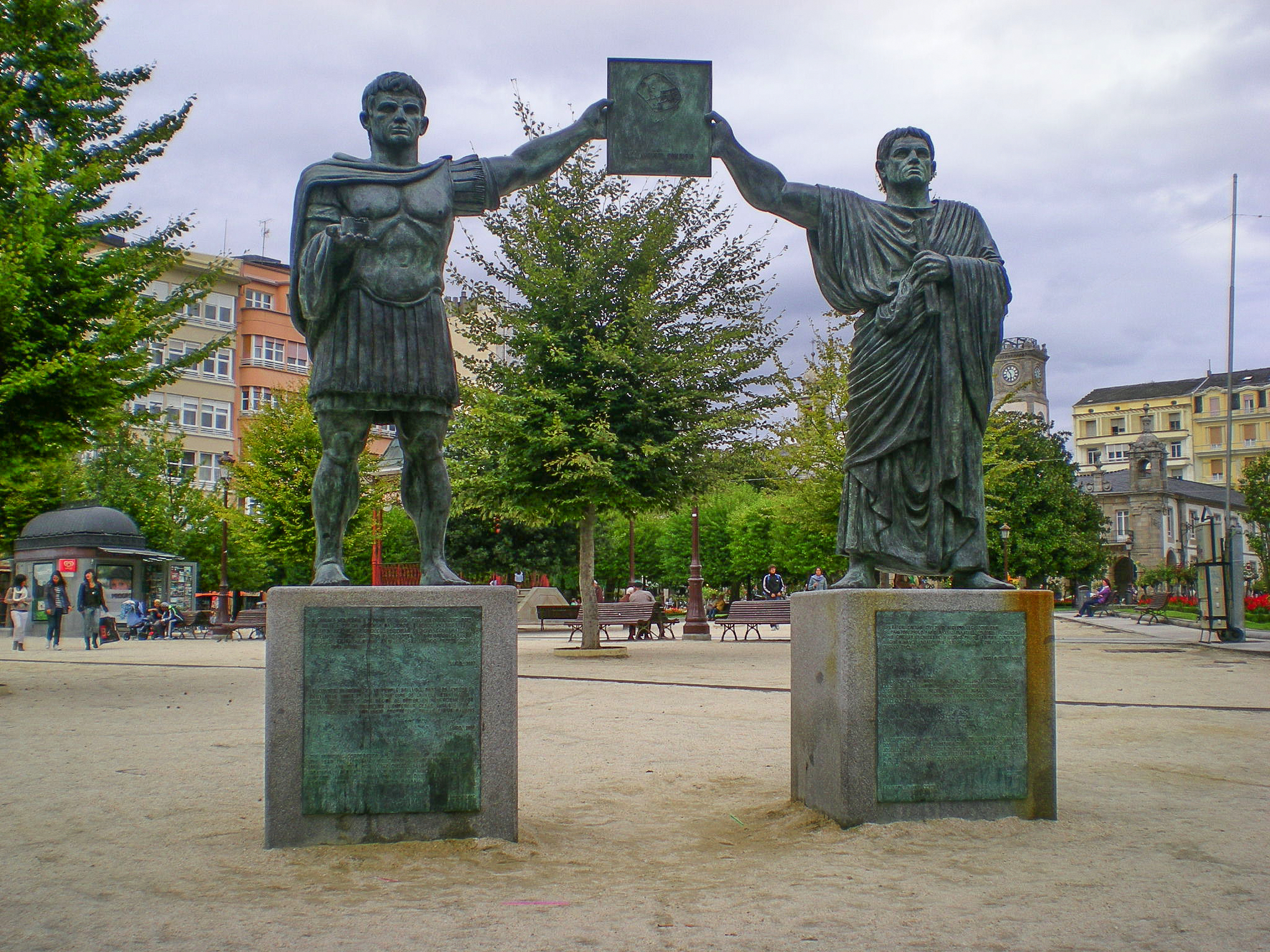 Estatúa adicada aos fundadores da cidade de Lugo na Praza Maior da cidade.